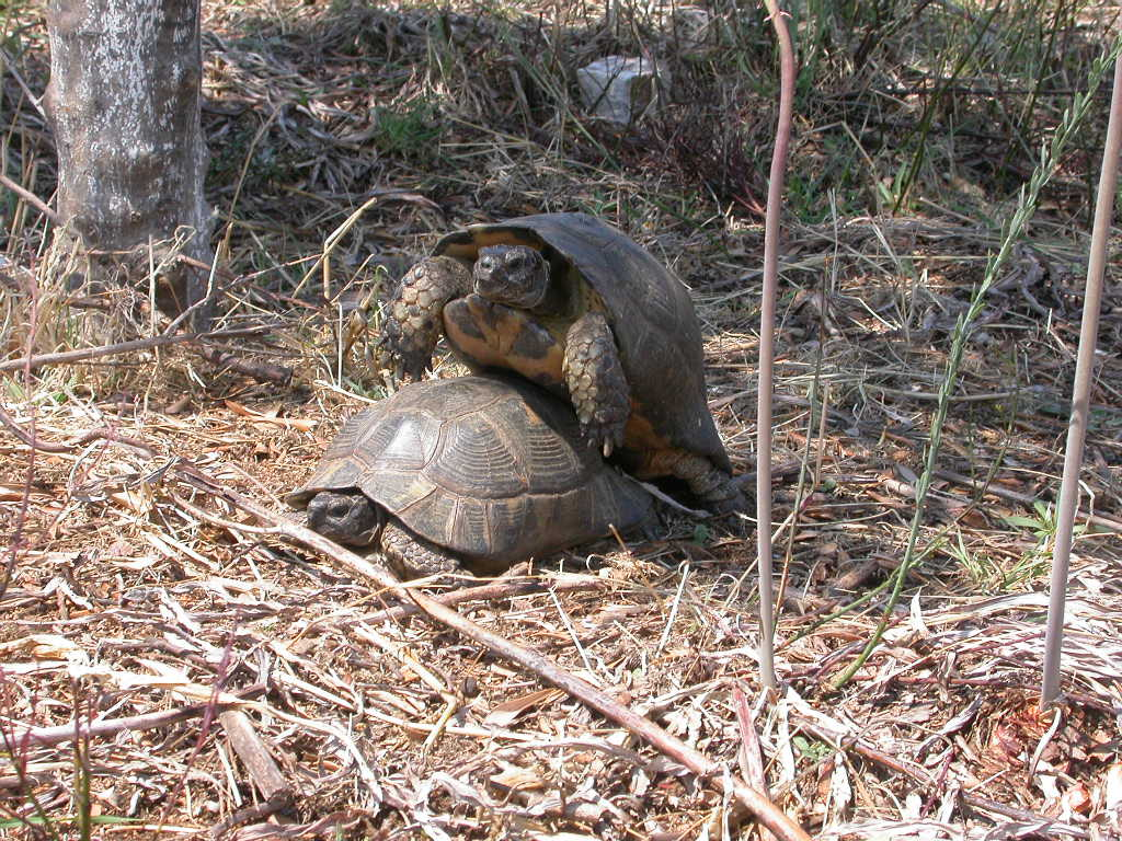 T._marginata_in_accoppiamento,__dintorni_di_Parga,_Grecia,_Agosto_2006